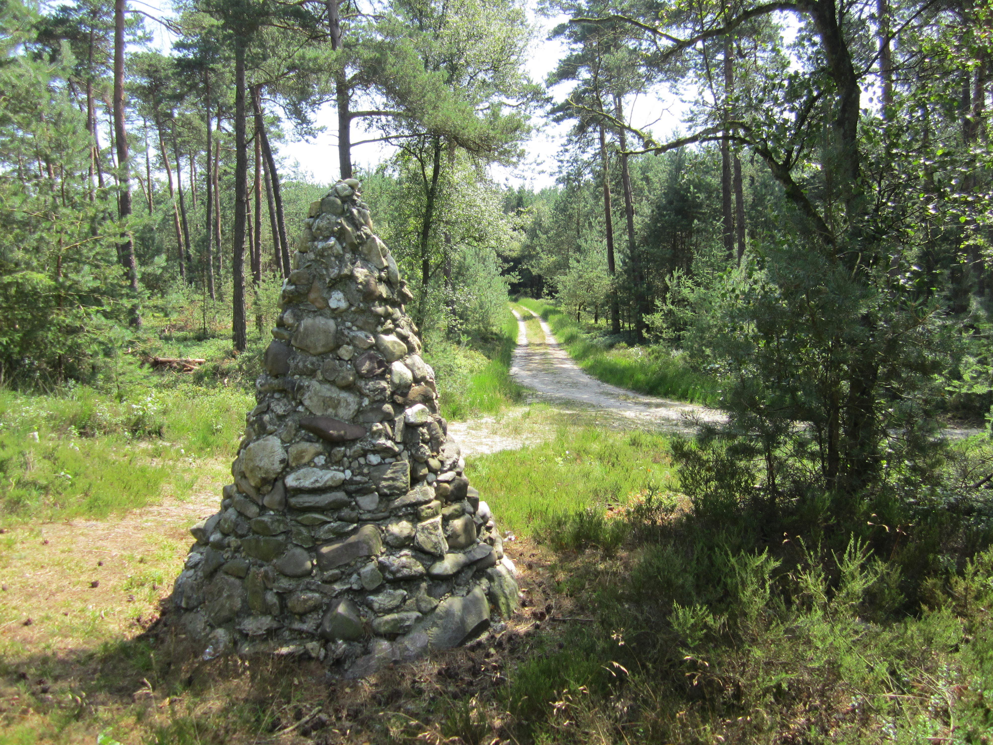 De in 2009 gerestaureerde Peter Paul piramide op landgoed Noorderheide, Vierhouten.